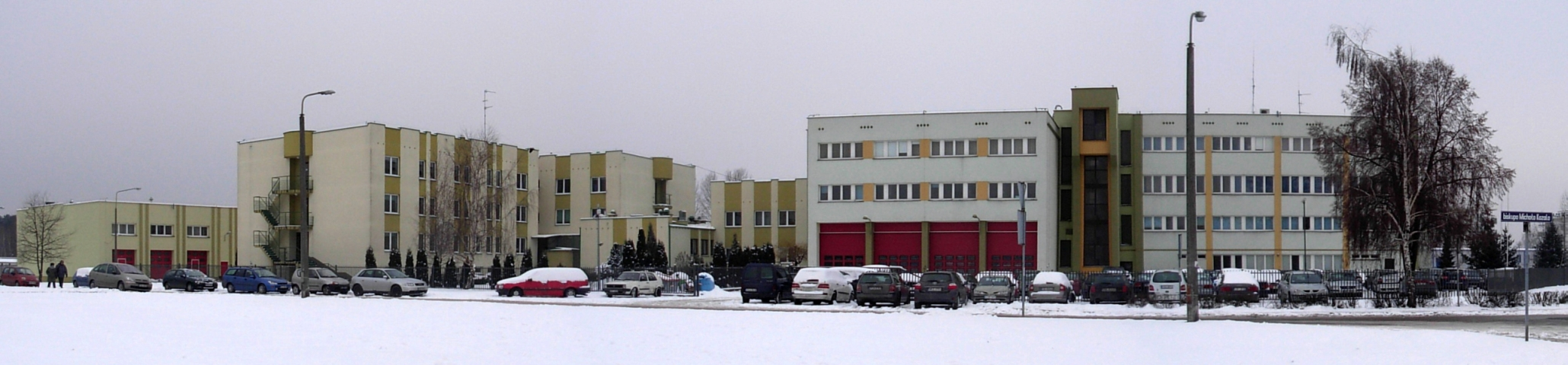 Szkoła Podoficerska Państwowej Straży Pożarnej na Glinkach w Bydgoszczy